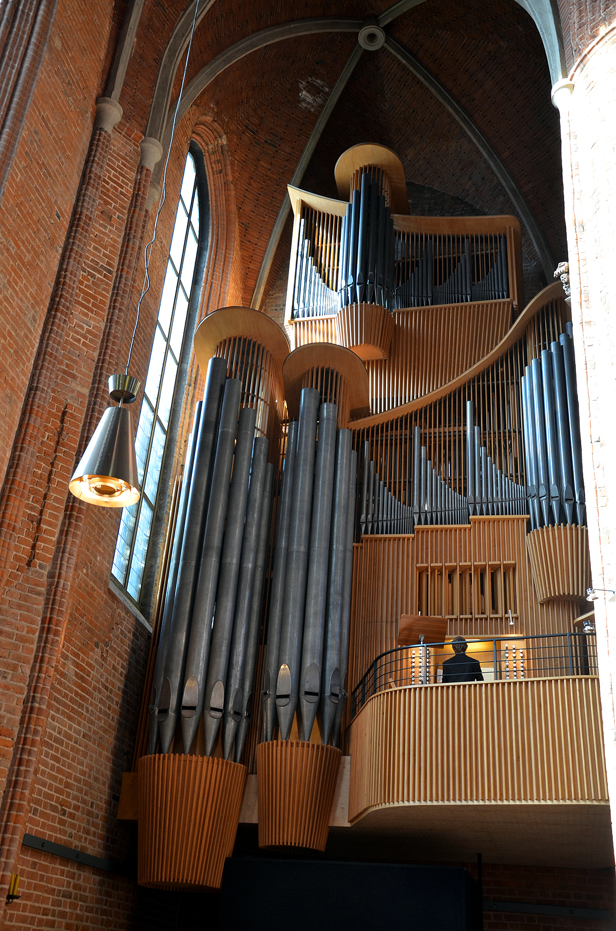 Der mehrfach ausgezeichnete Organist und Kirchenmusiker Ulfert Smidt, hier an einem Sonntag Vormittagan einem seiner Arbeitsplätze, der Großen Orgel in der Marktkirche von Hannover wähend eines Gottesdienstes mit Pastor Wolfgang Puschmann ...